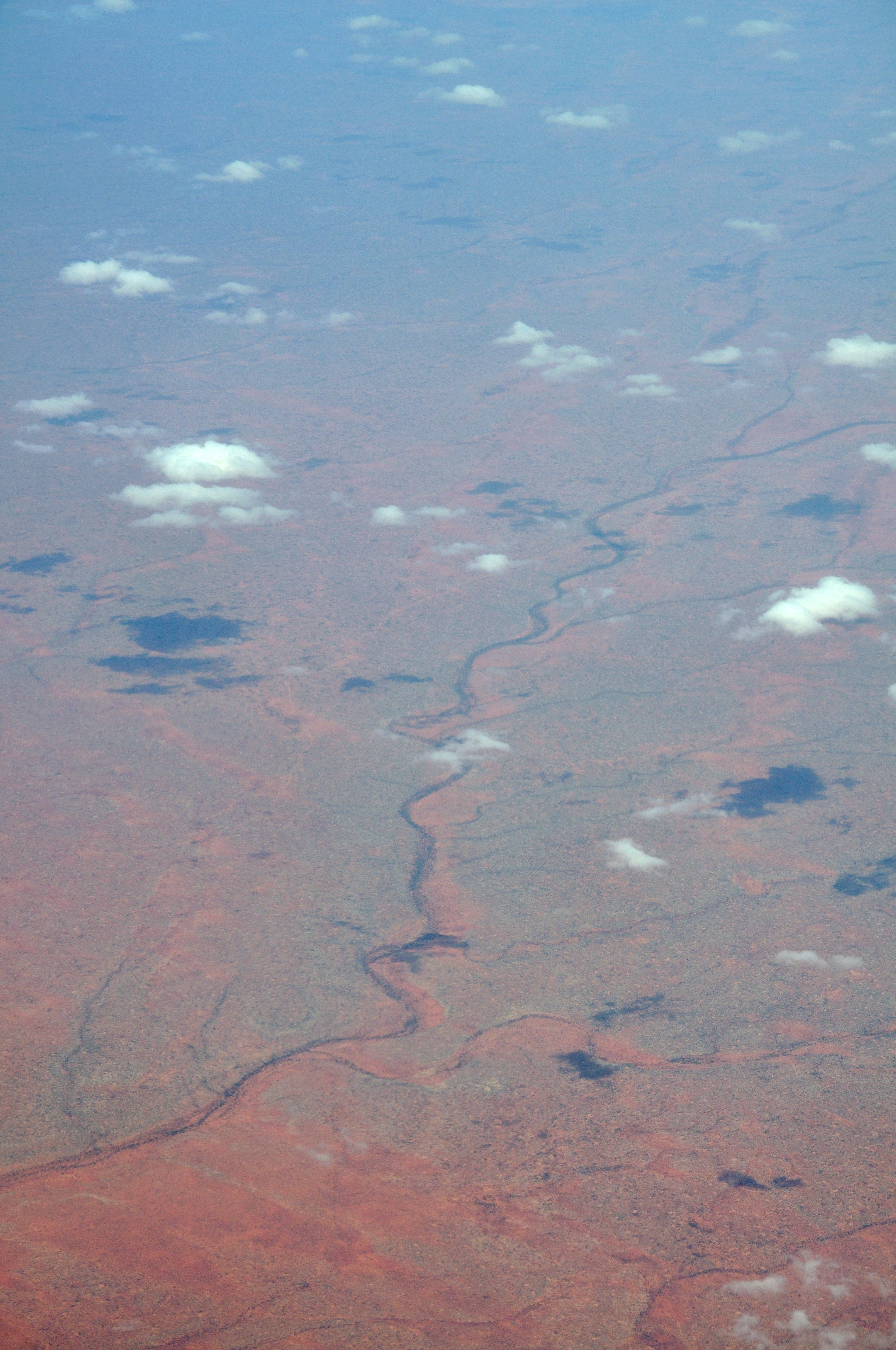 Overhead Sarax Darandoole, Somalia